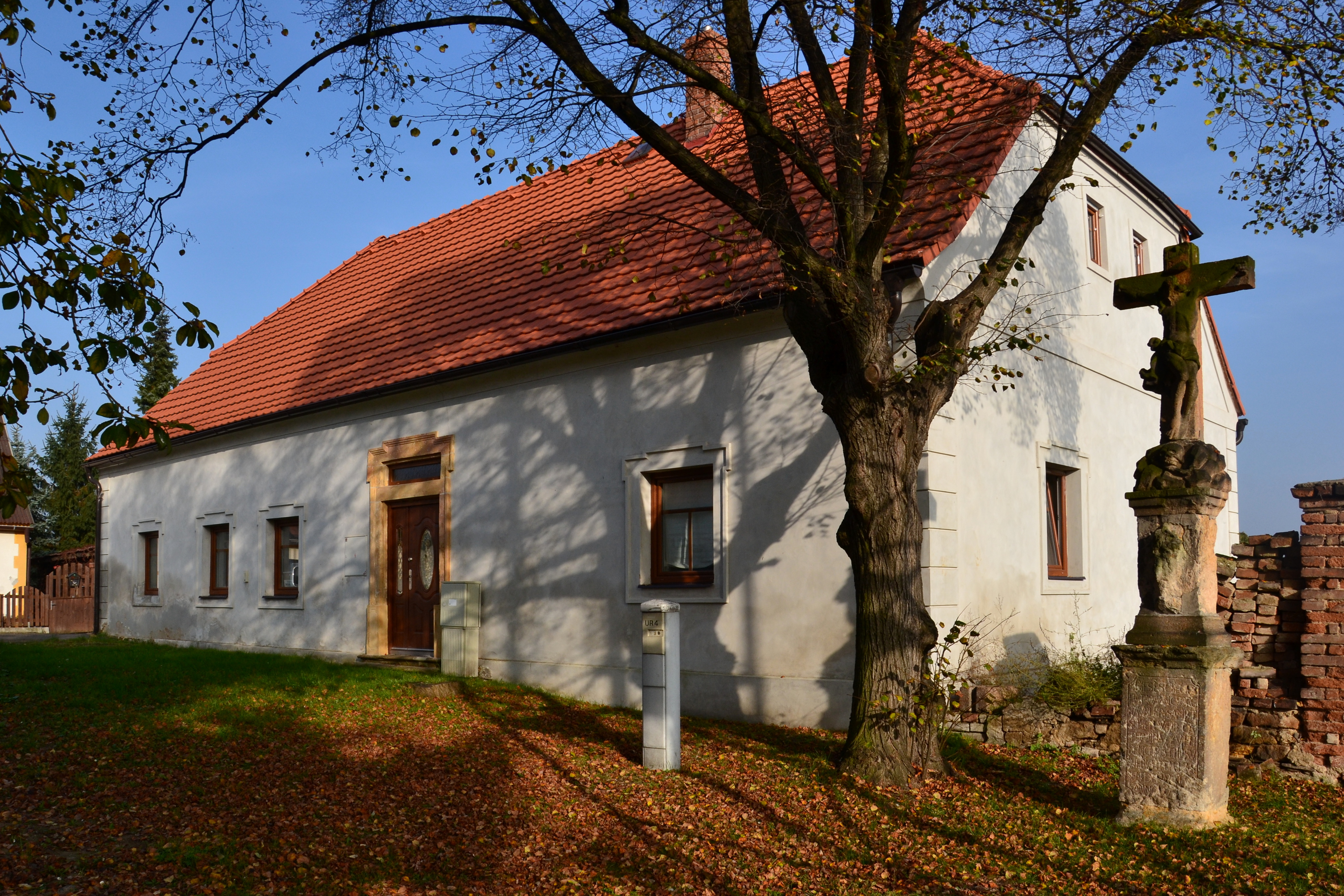 Všestudy - dům čp. 30